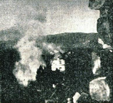 Med boji za Turjak.